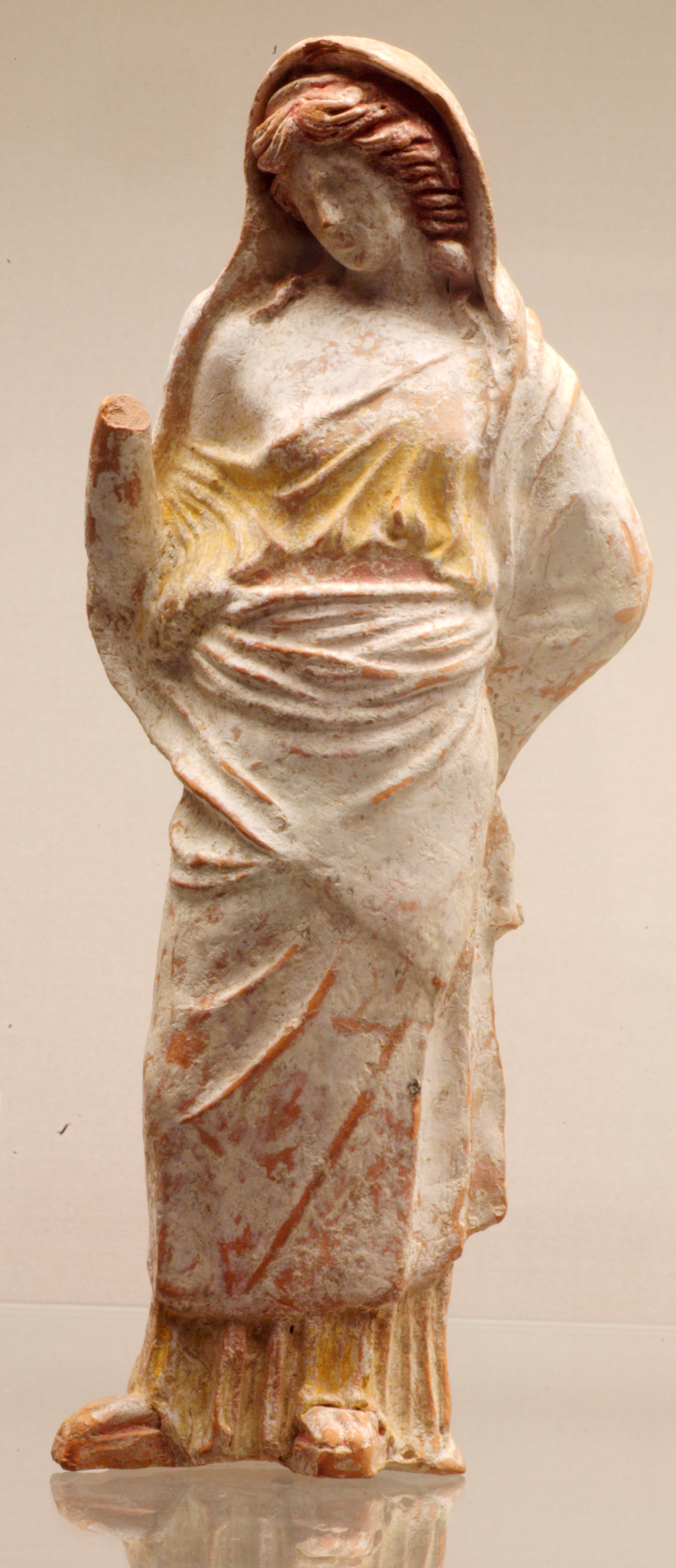 Attische Terrakottastaue einer Frau. Attische Terrakotta aus dem 4.Jhdt. v.Chr. Staatliche Antikensammlungen München